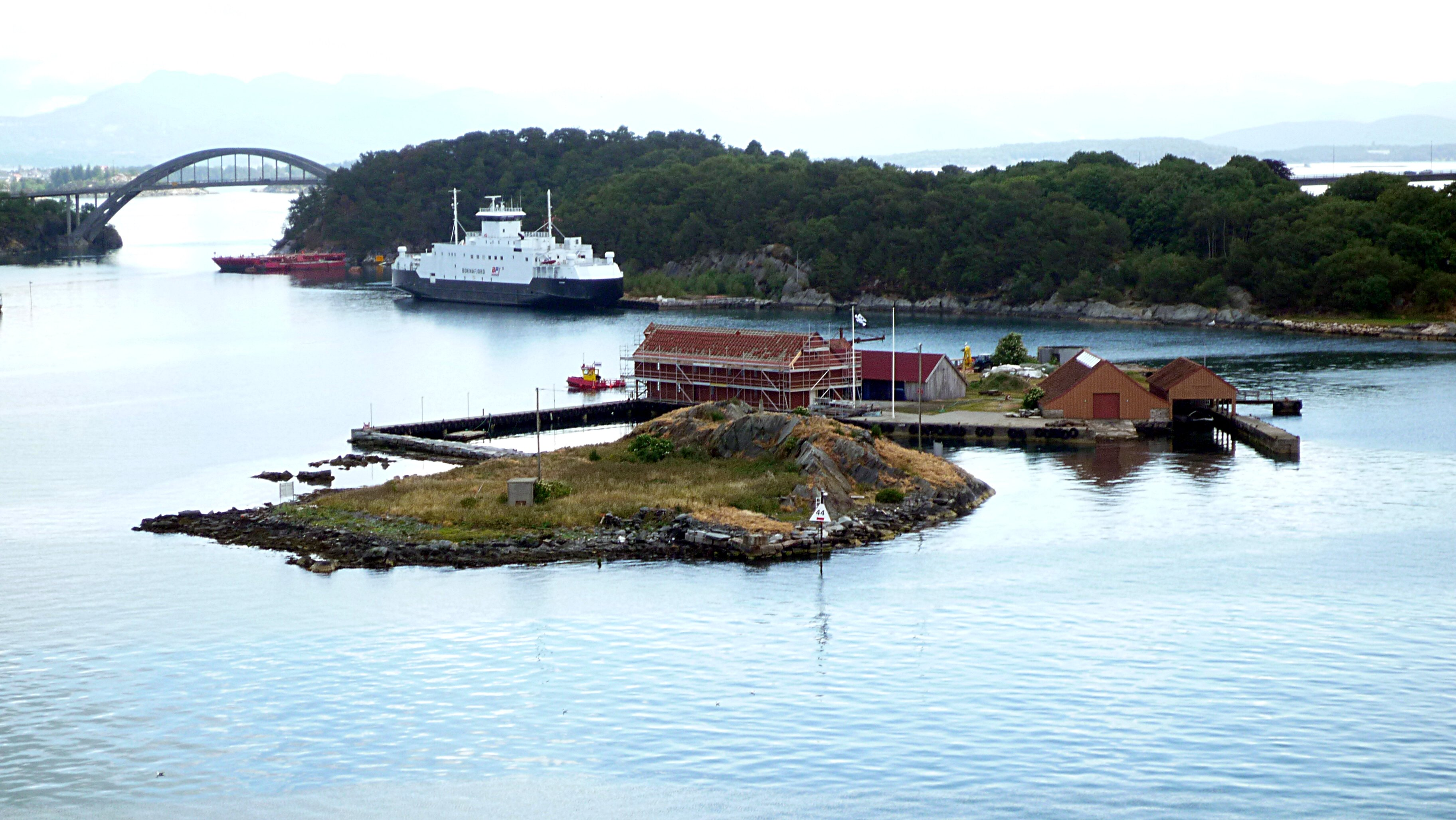 Holmane Plentingen og Natvigs Minne i Byfjorden i Stavanger. Ferja MS Boknafjord ligg ved øya Sølyst. Brua i bakgrunnen går over Engøysundet mellom Sølyst og Engøya